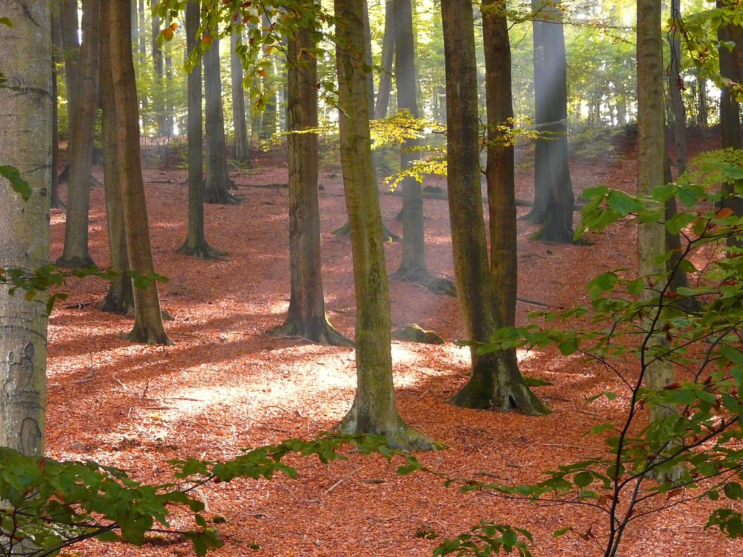 NSG SO-029, Hallenbuchenwald im nördlichen Arnsberger Wald